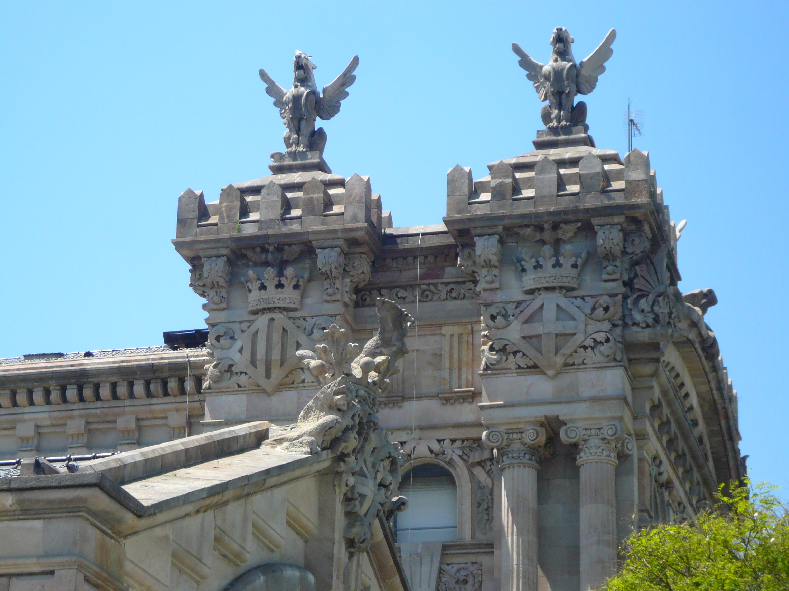 Escuts i lleons. Pg. de Josep Carner, 29, Duana de Barcelona (Barcelona). Escultor: Eusebi Arnau. Arquitecte: Enric Sagnier i Villavecchia amb la col·laboració de l'enginyer Pere García Faria. 1896-1902. 24″ N, 2° 10′ 38.02″ E